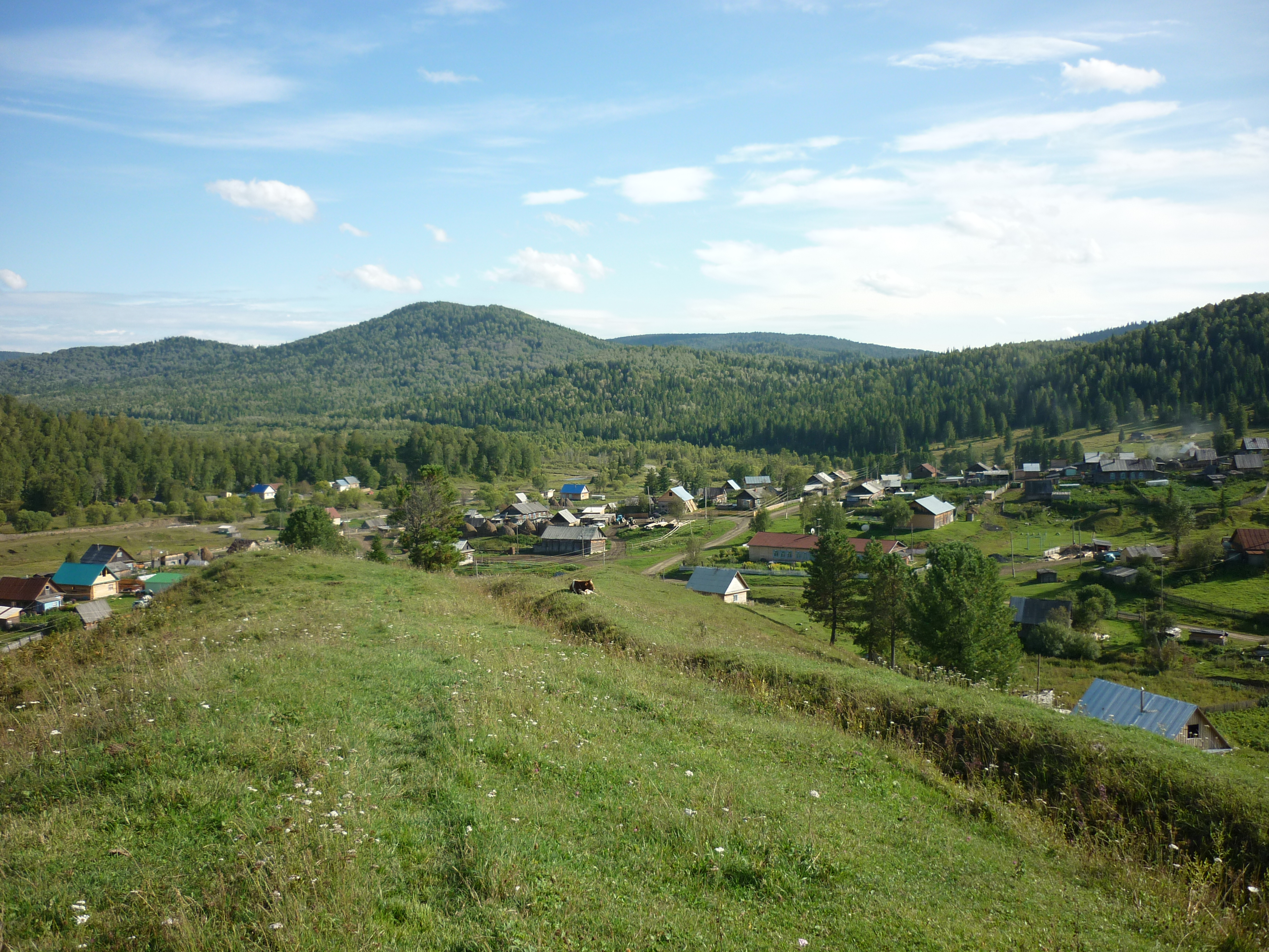 Моя собственная работа!